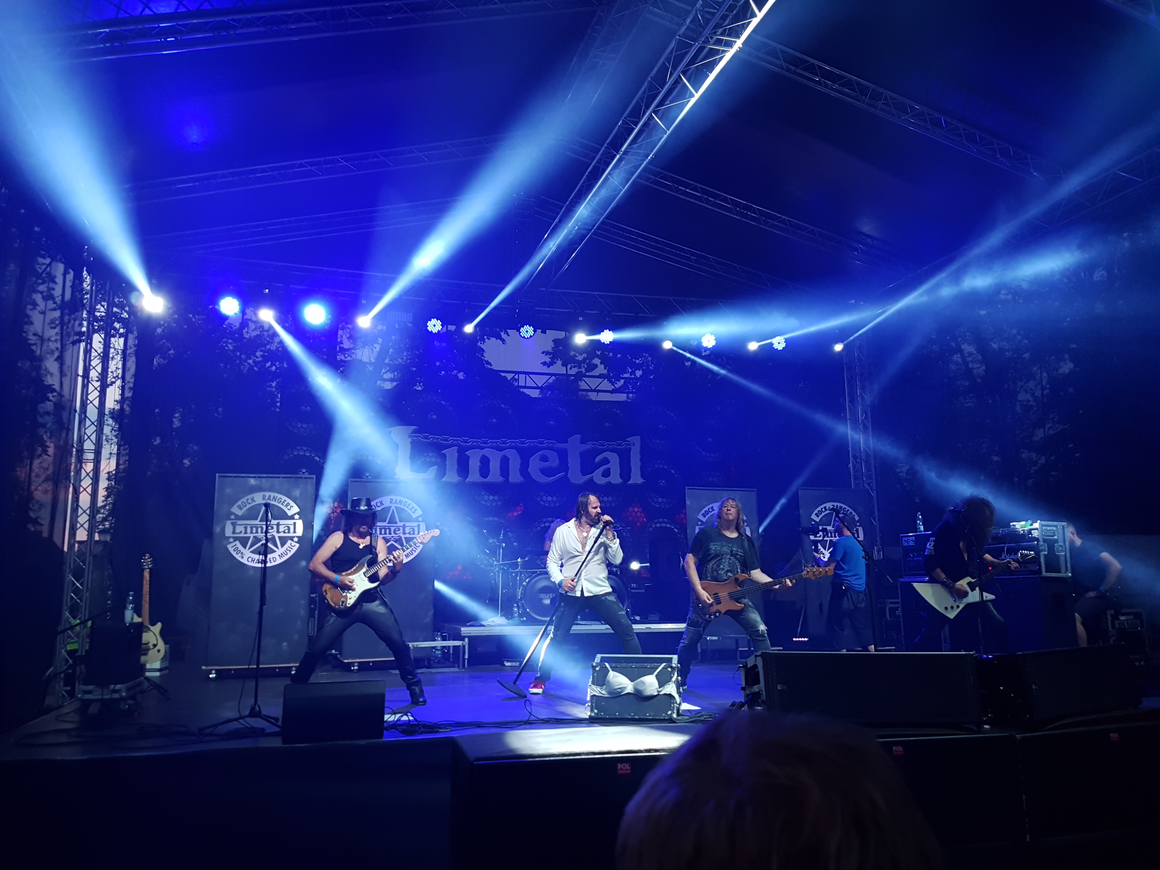 Vystoupení na českotěšínském festivalu "Rockování nad Olzou"